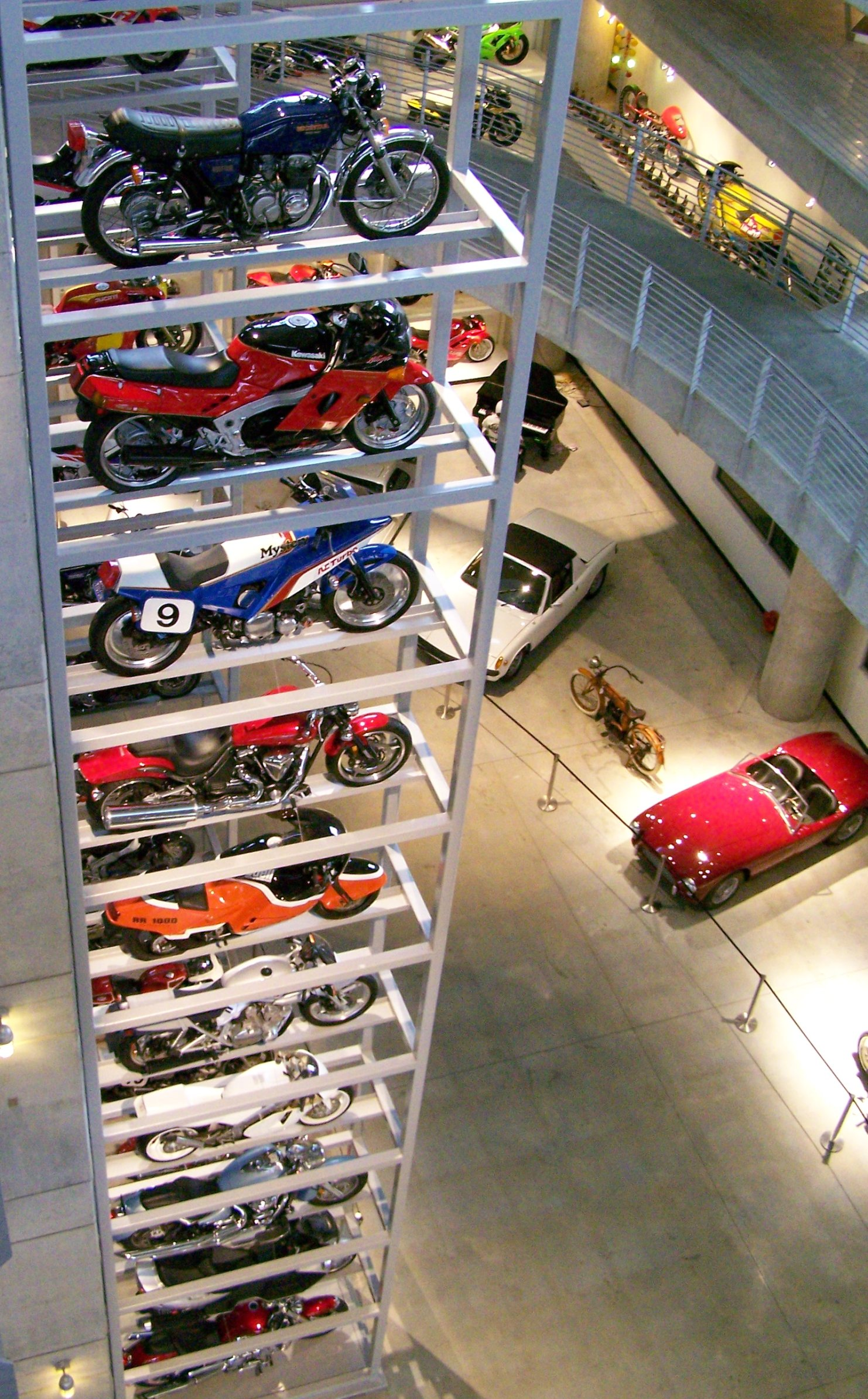 Stacked in Barber Vintage Motorsports Museum